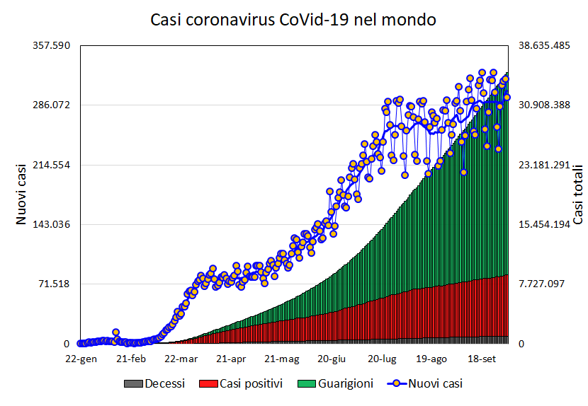 Andamento giornaliero dei casi relativi alla pandemia di COVID-19. Sono evidenziati decessi, guarigioni, casi attivi e nuovi casi giornalieri.